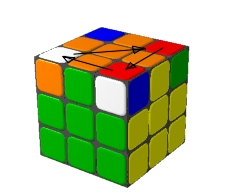 figura 16 Dibujo realizado por Josemanuel